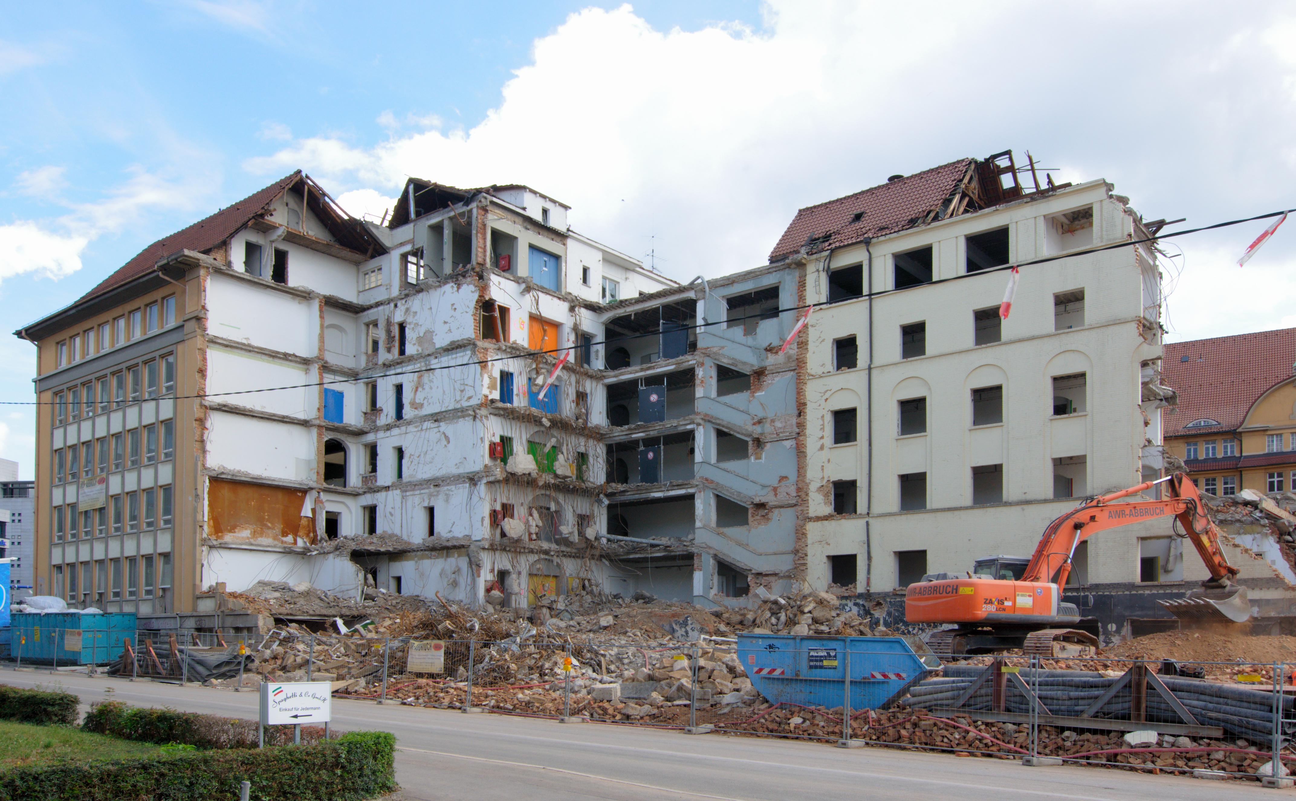 Abriss des rückwärtigen Teils der alten Bahndirektion Stuttgart